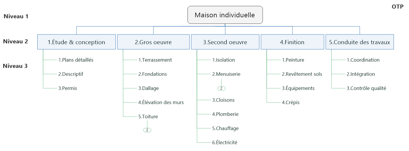 Exemple d'Organigramme des Tâches du Projet (OTP) - Présentation graphique